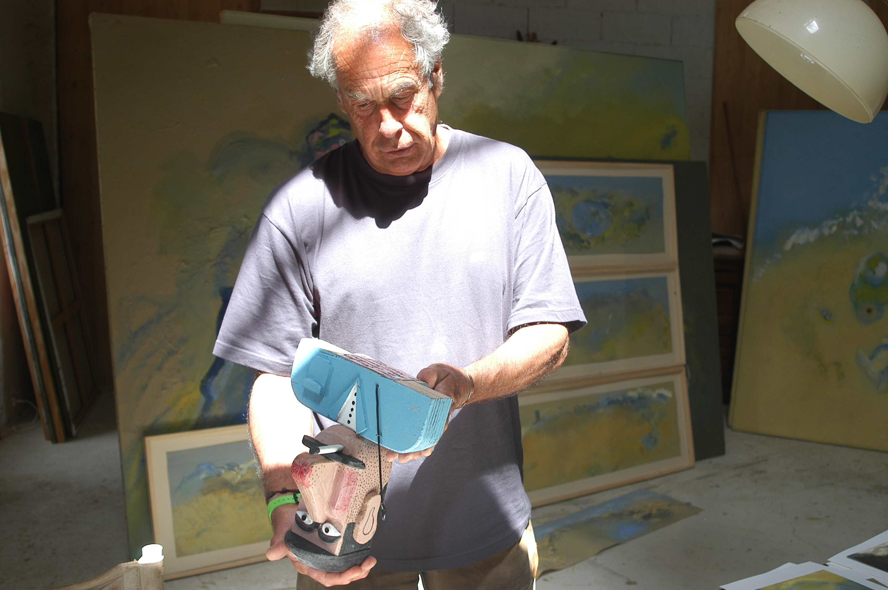 Yves Lévêque dans son atelier d'Escorpain